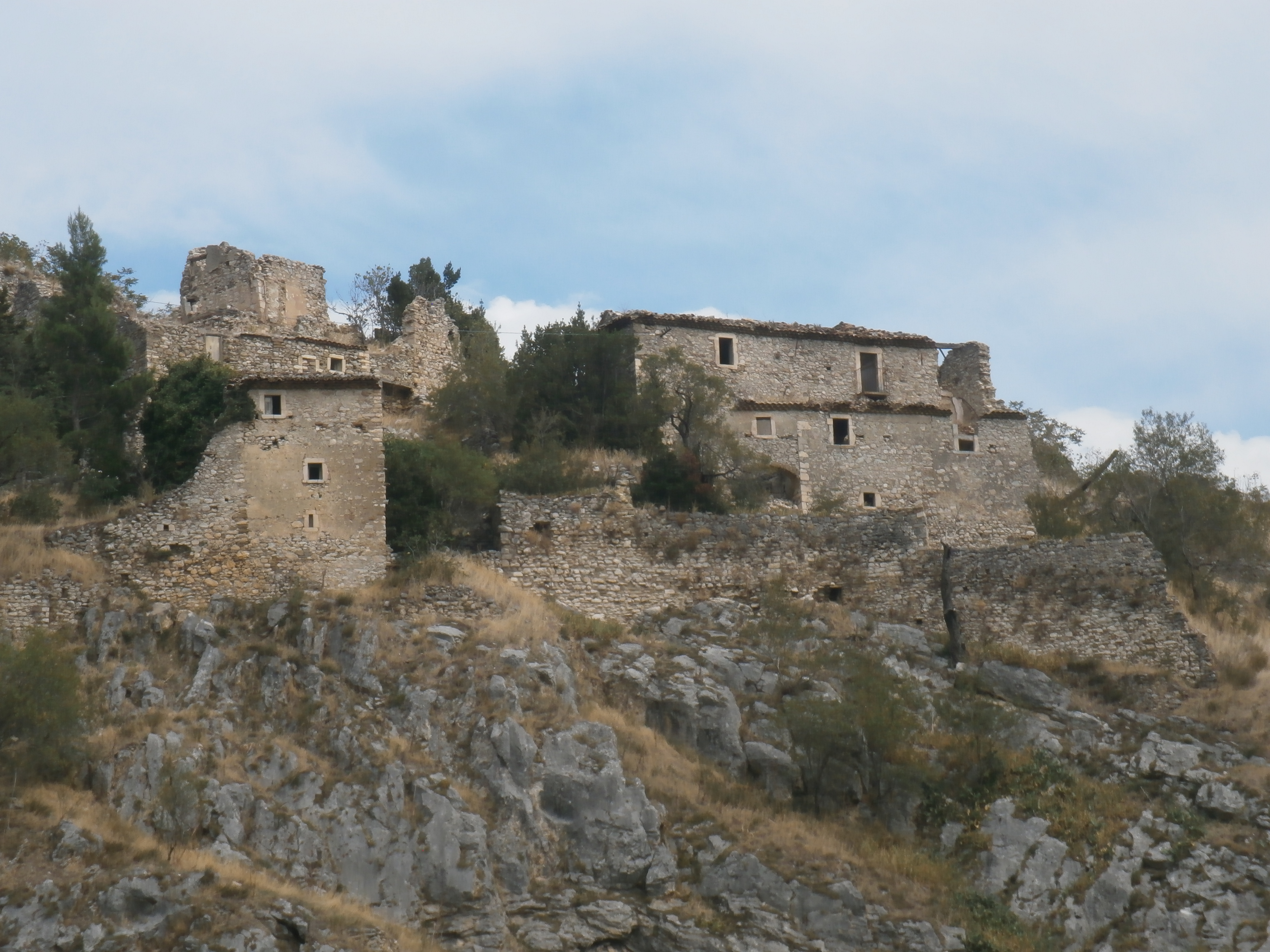 Scorci dell'antico paese abbandonato